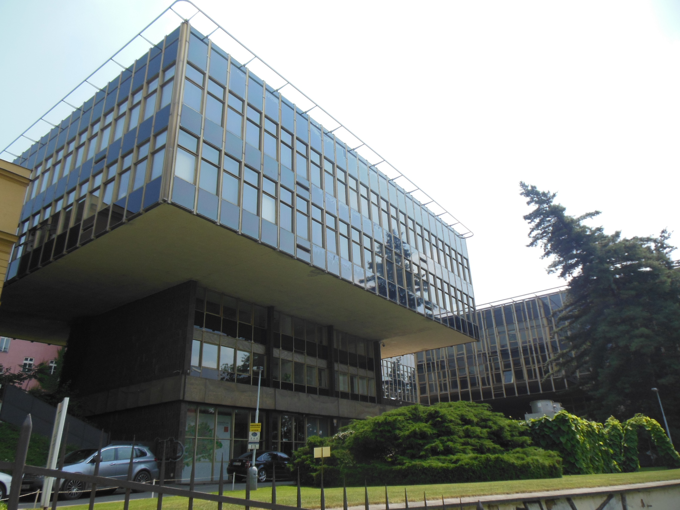 Sídlo Útvaru rozvoje hl. m. Prahy v budově č. 2077/57 v ulici Vyšehradská na Novém Městě v Praze. Pohled z ulice Pod Slovany.